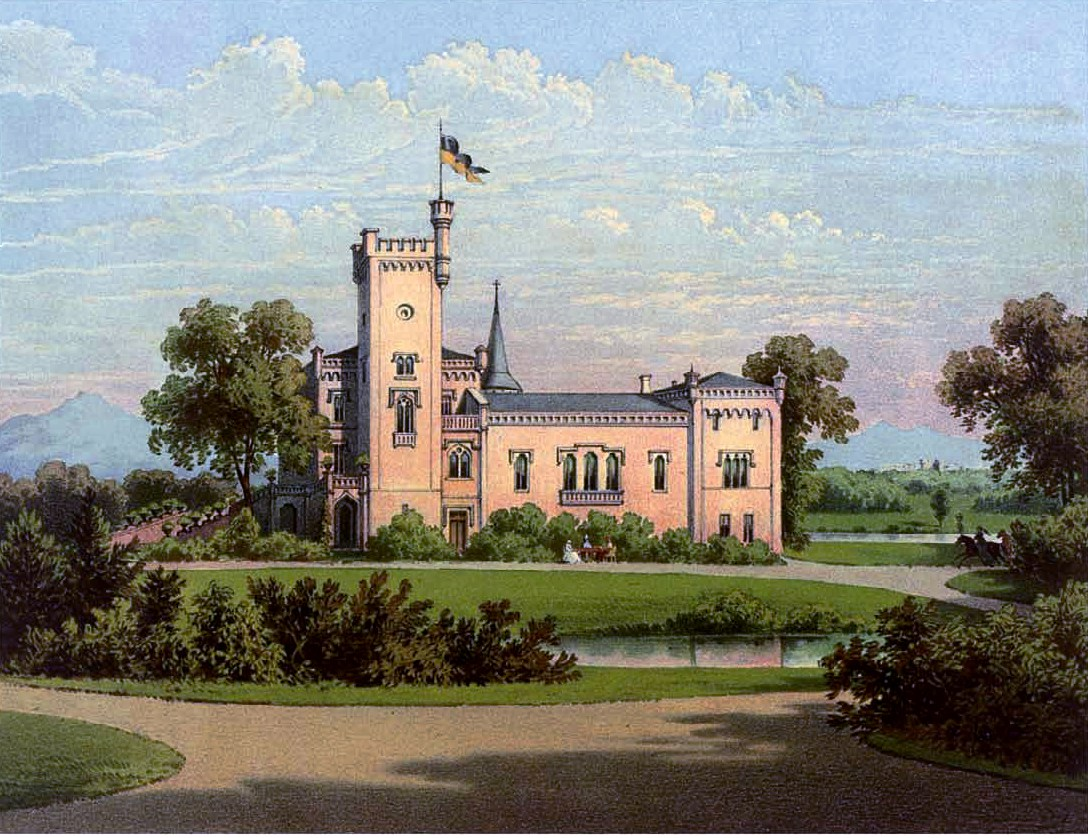 Schloss Lorzendorf, Kreis Neumarkt, Schlesien.